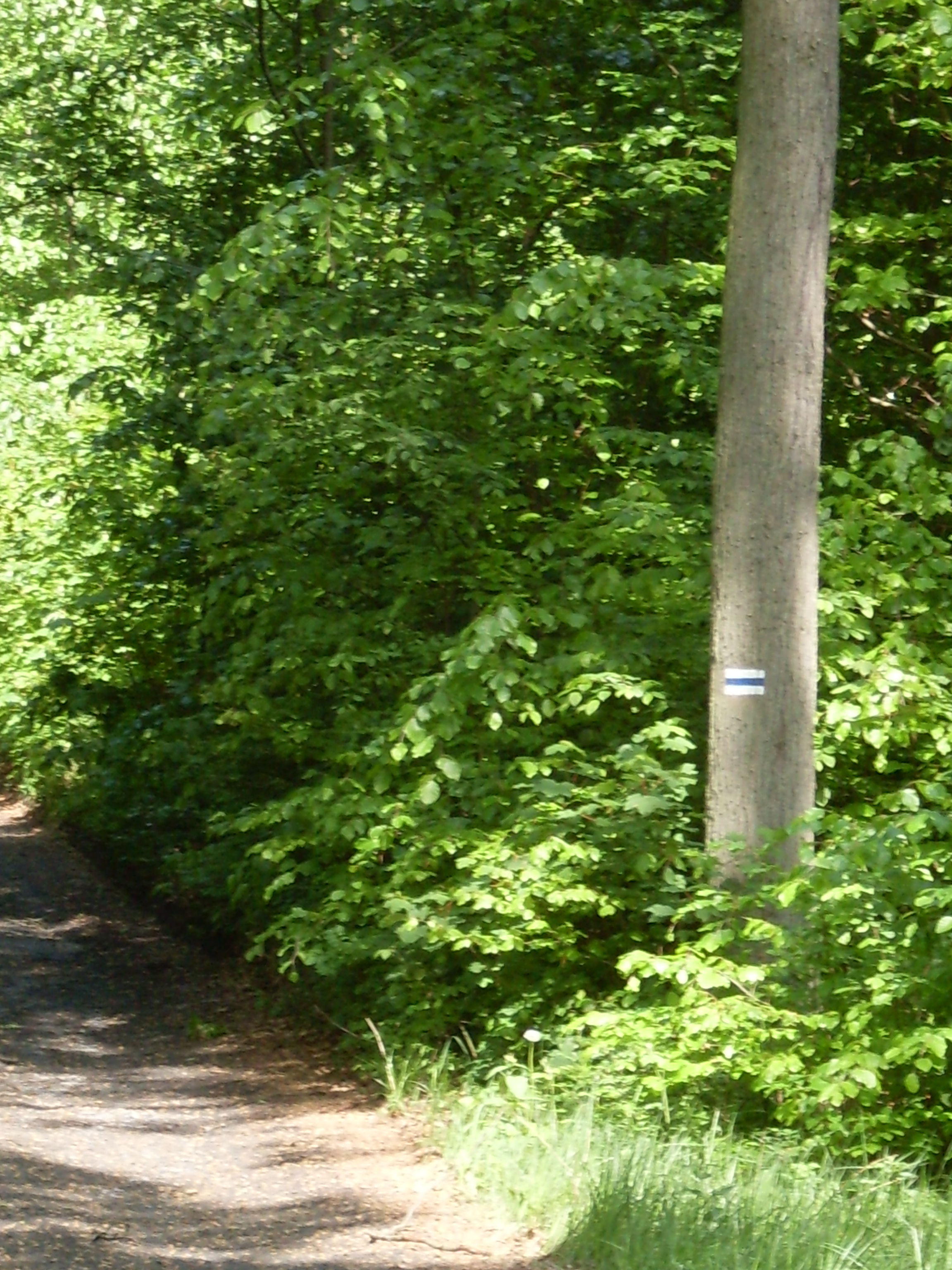 Szlak Pokoju, Puszcza Wkrzańska